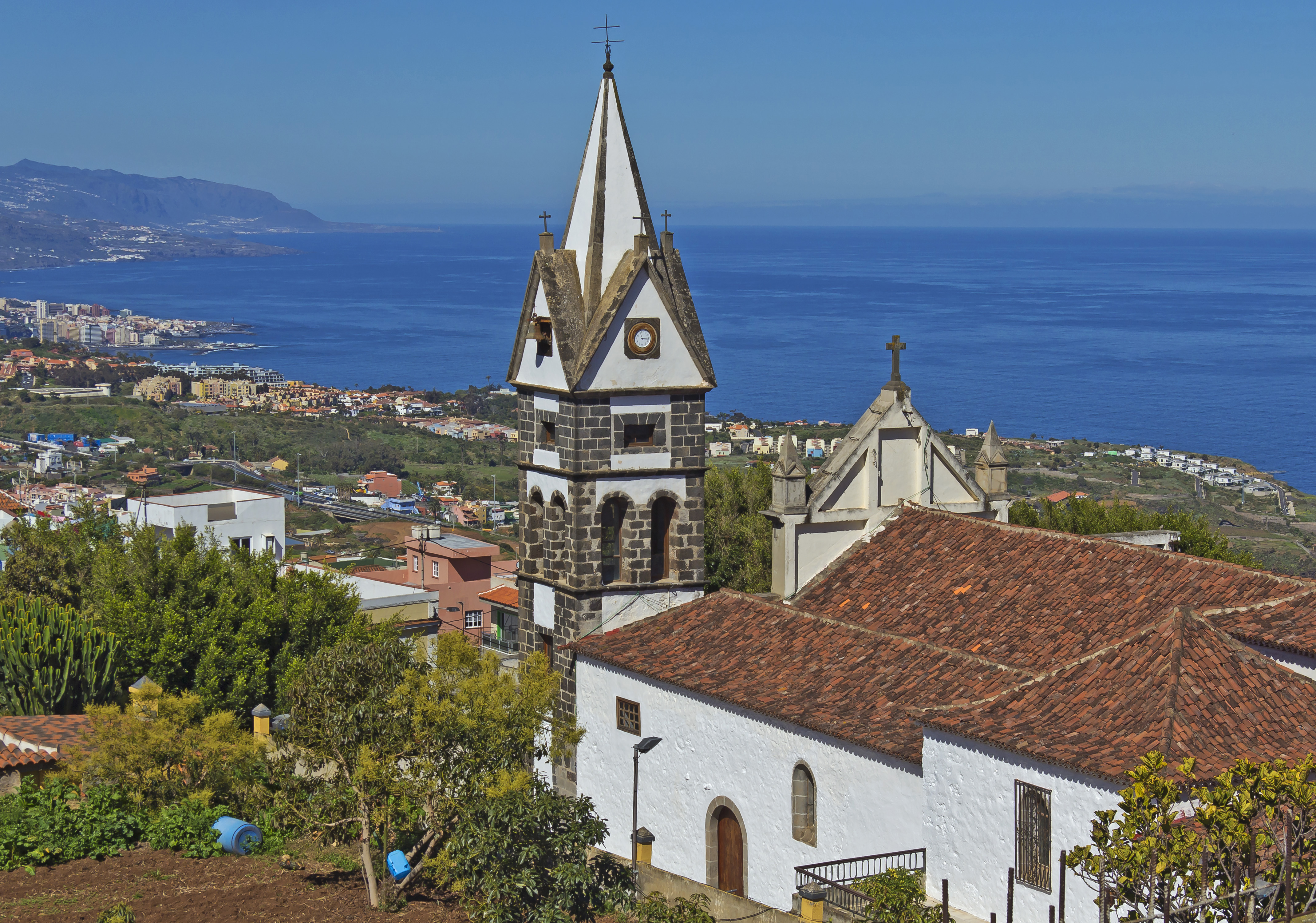 Parroquia de Nuestra Señora de la Victoria, La Victoria, Tenerife, Canarias